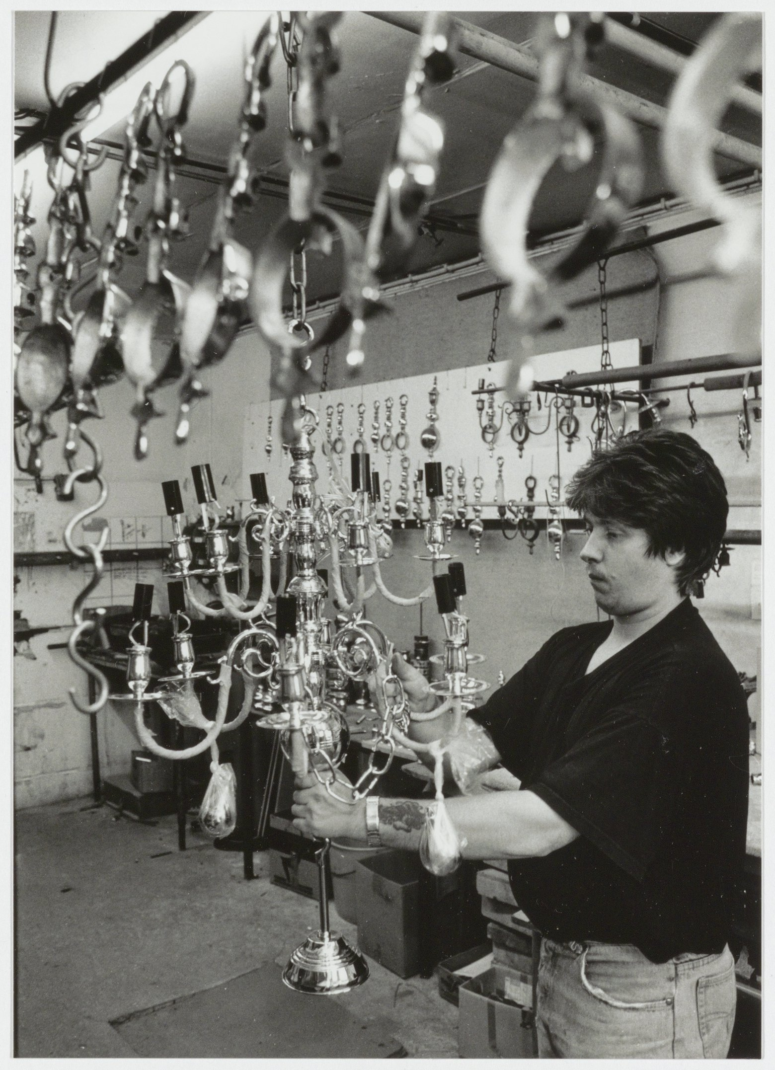 CollectieCollectie Fotoburo de BoerInventarisnummerNL-HlmNHA_54035339NL-HlmNHA_1478_40161kBeschrijvingKoperen kandelaars in de Kopergieterij Brink & van Keulen aan de Koudenhorn 66-70, tijdens Open Monumentendag.FotonummerNL-HlmNHA_1478_2423DocumenttypeHistorieprenten, tekeningen en foto'sVervaardigerBoer, Poppe de Soort vervaardigerFotograaf AnnotatiesHD 060994LandNederland ProvincieNoord-Holland GemeenteHaarlem PlaatsHaarlem StraatKoudenhorn Begindatum09-1994Einddatum09-1994TechniekFoto Trefwoordenberoepen en ambachten